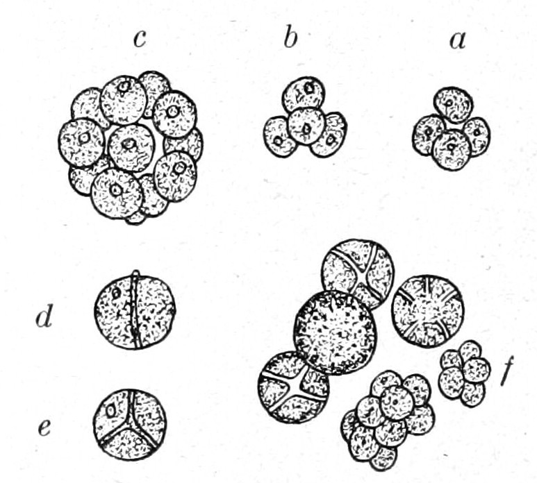 Chlorella regularis